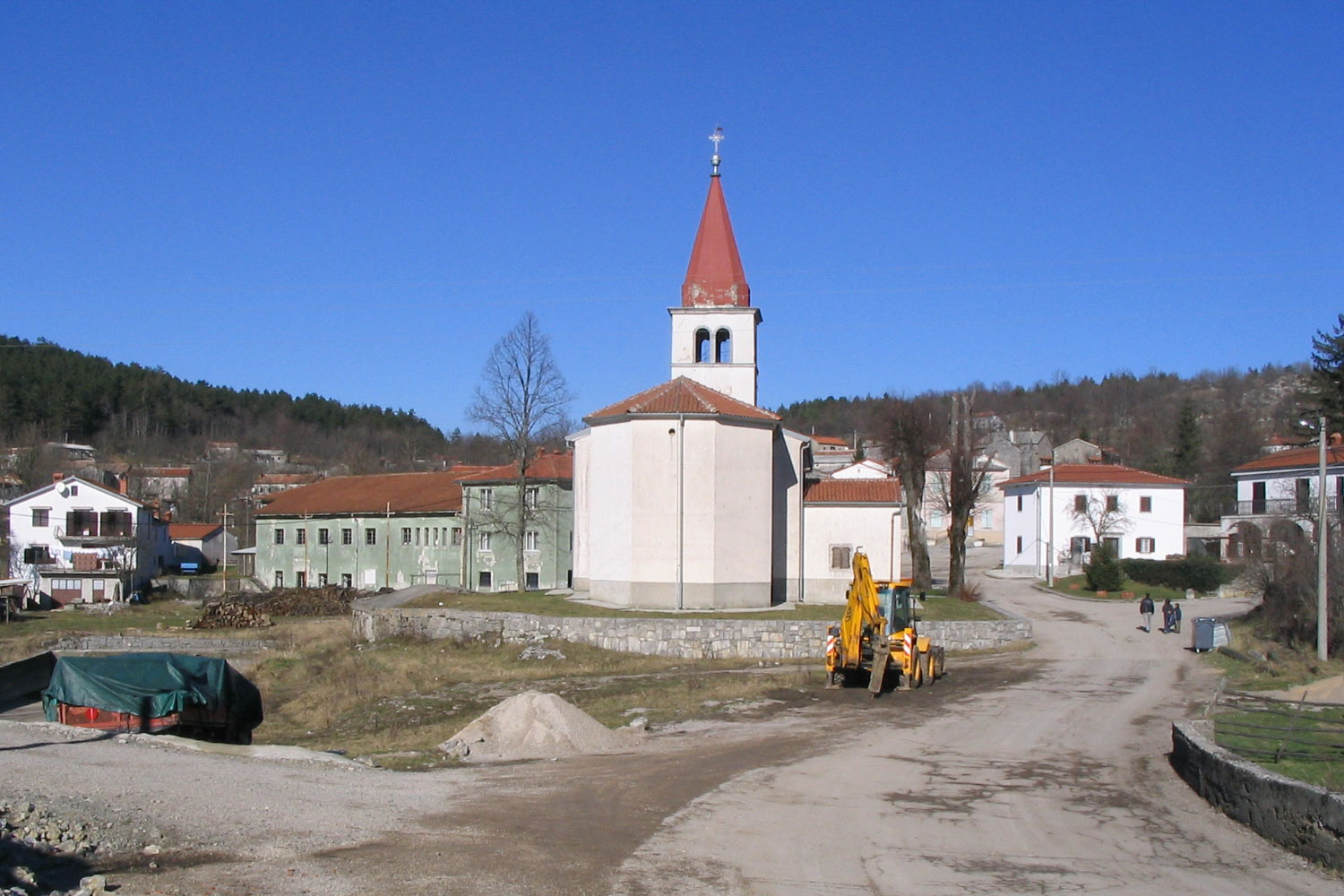 Vele Mune, Istria, Croatia+